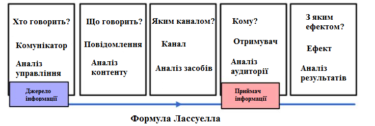 укр версія